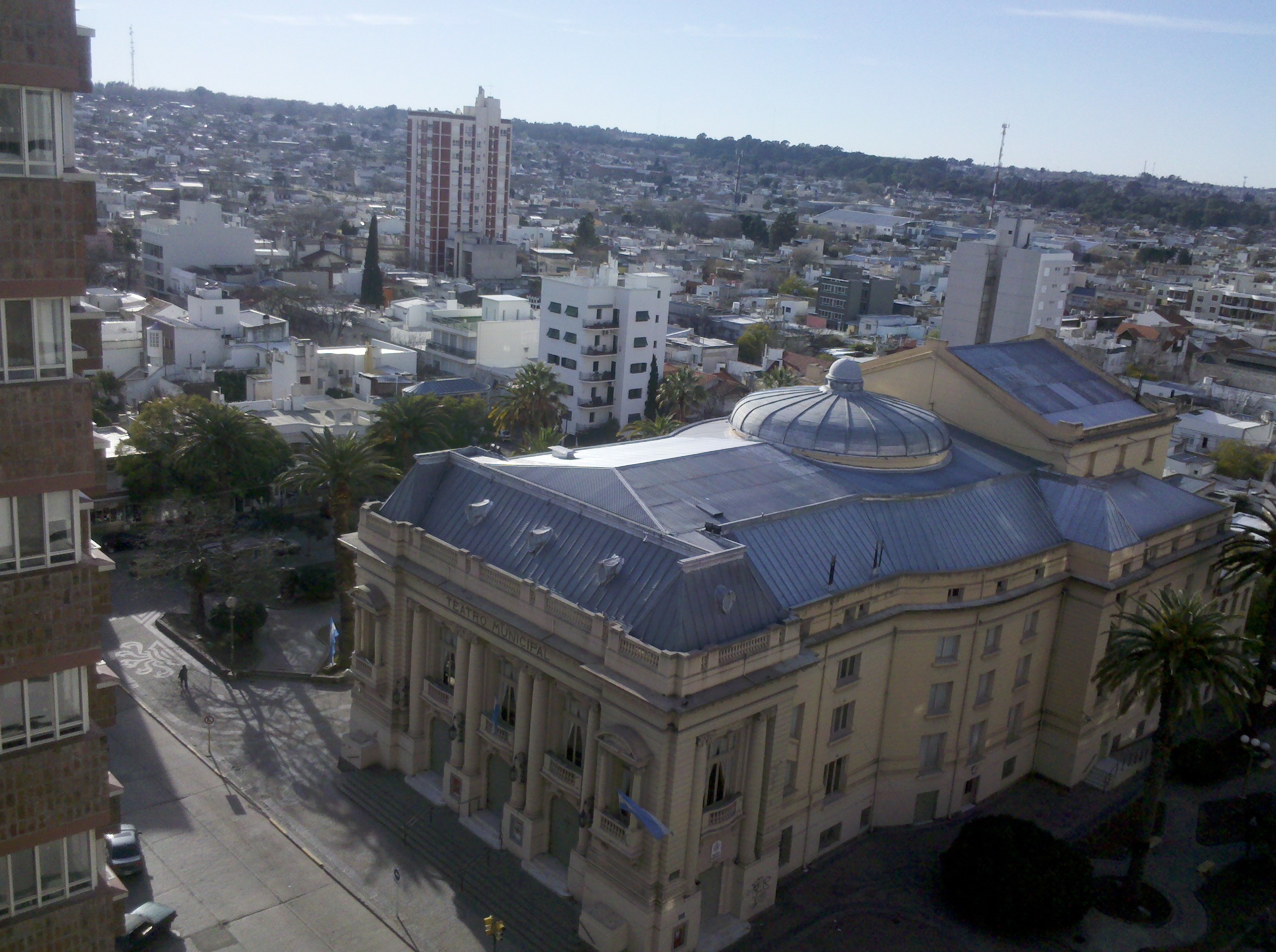 Teatro Municipal y Plazoletas Payró